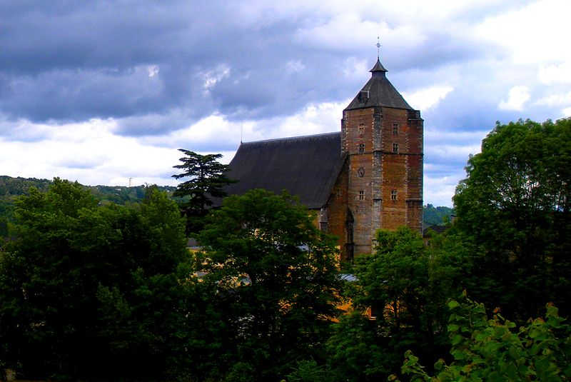 Iglesia de Monenh, Bearne, Eglise de Monein, Bearn